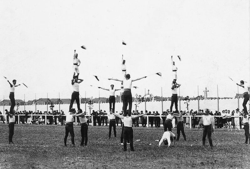 Pokaz gimnastycznny Tow. Sokół w Dechy we Francji, w latach dwudziestych